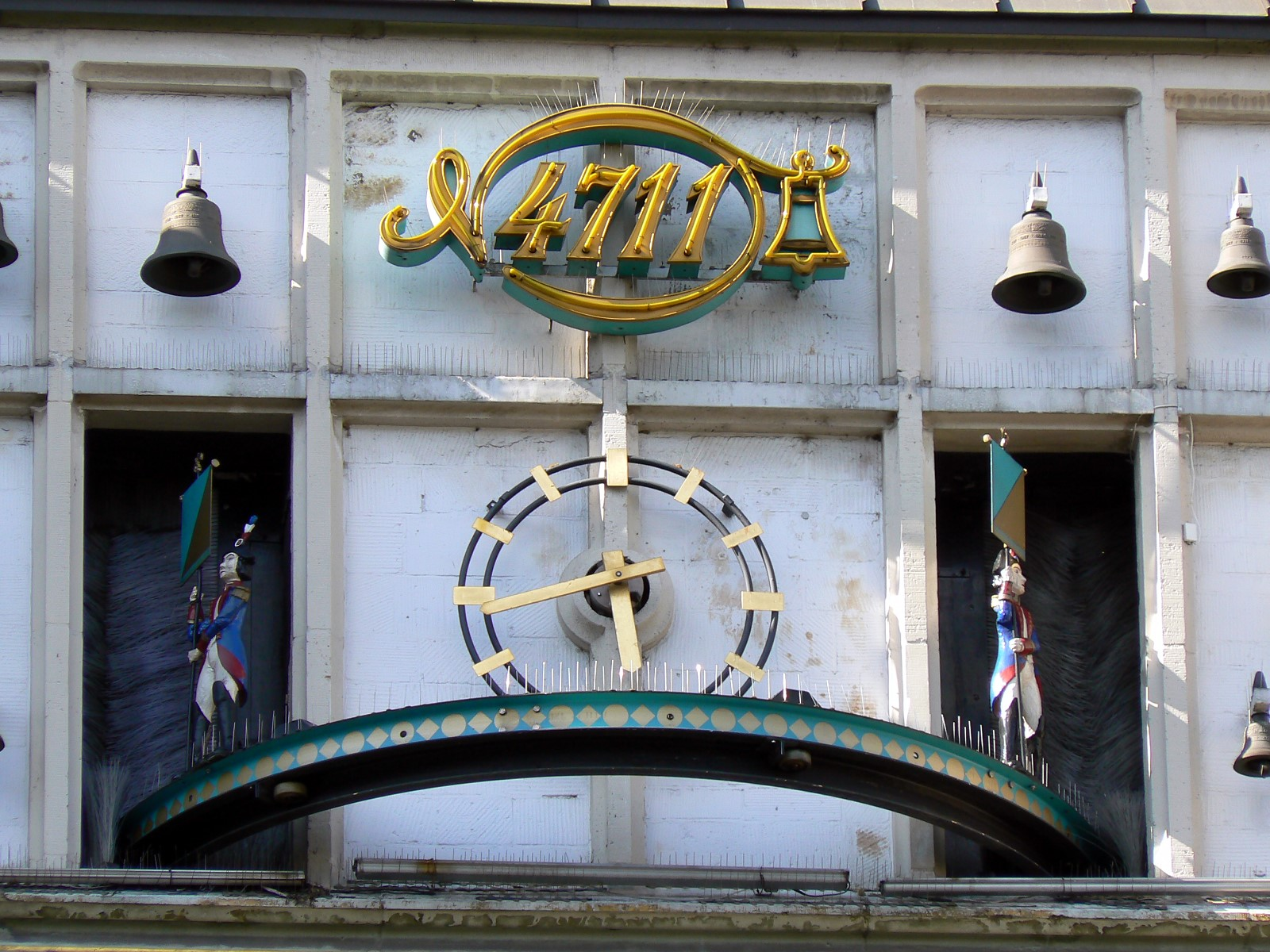 Glockengasse 4711 in Köln: Uhr mit Glockenspiel.